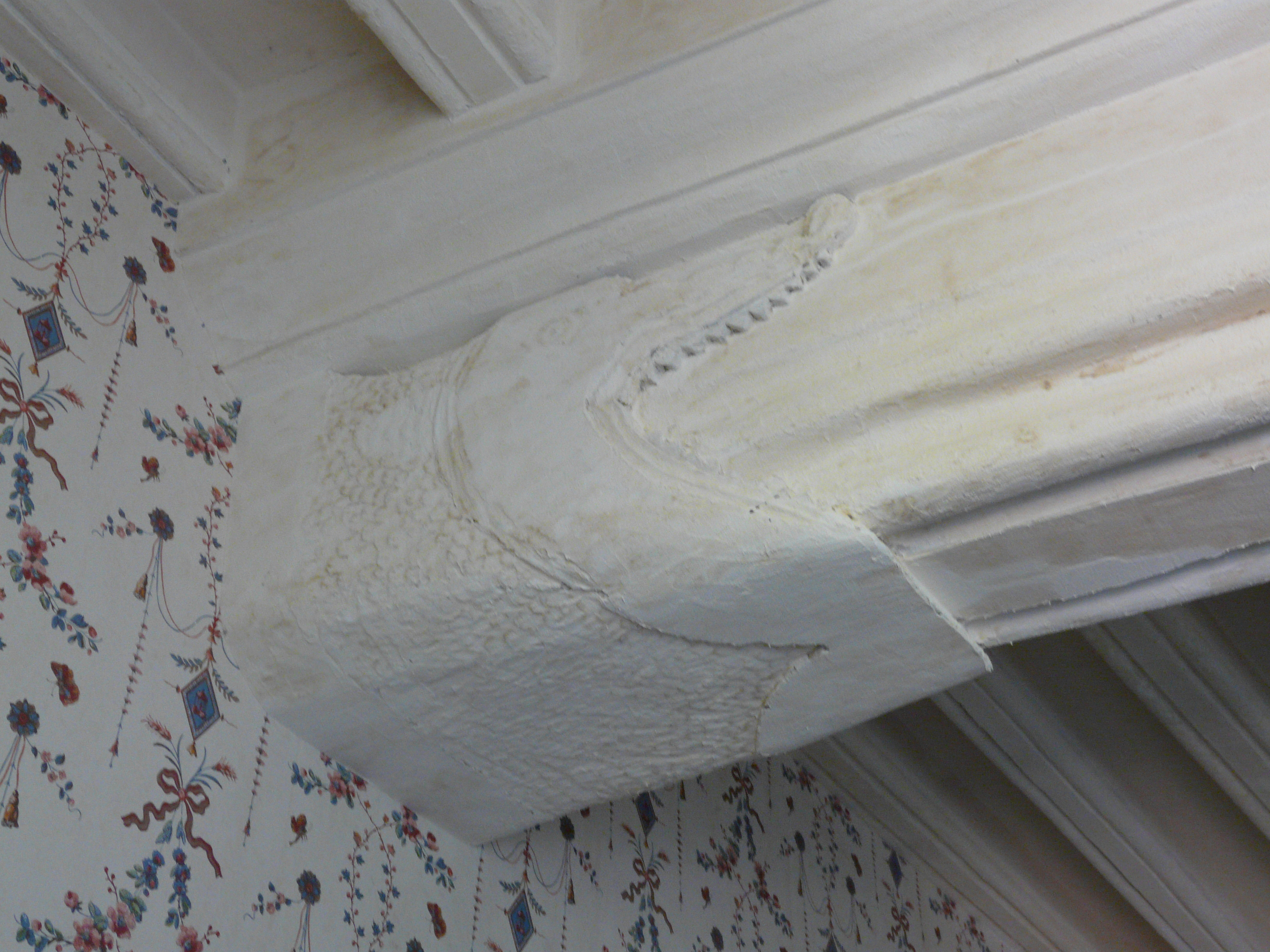 Poutres à engoulants de l'étage supérieur de l'aile Est